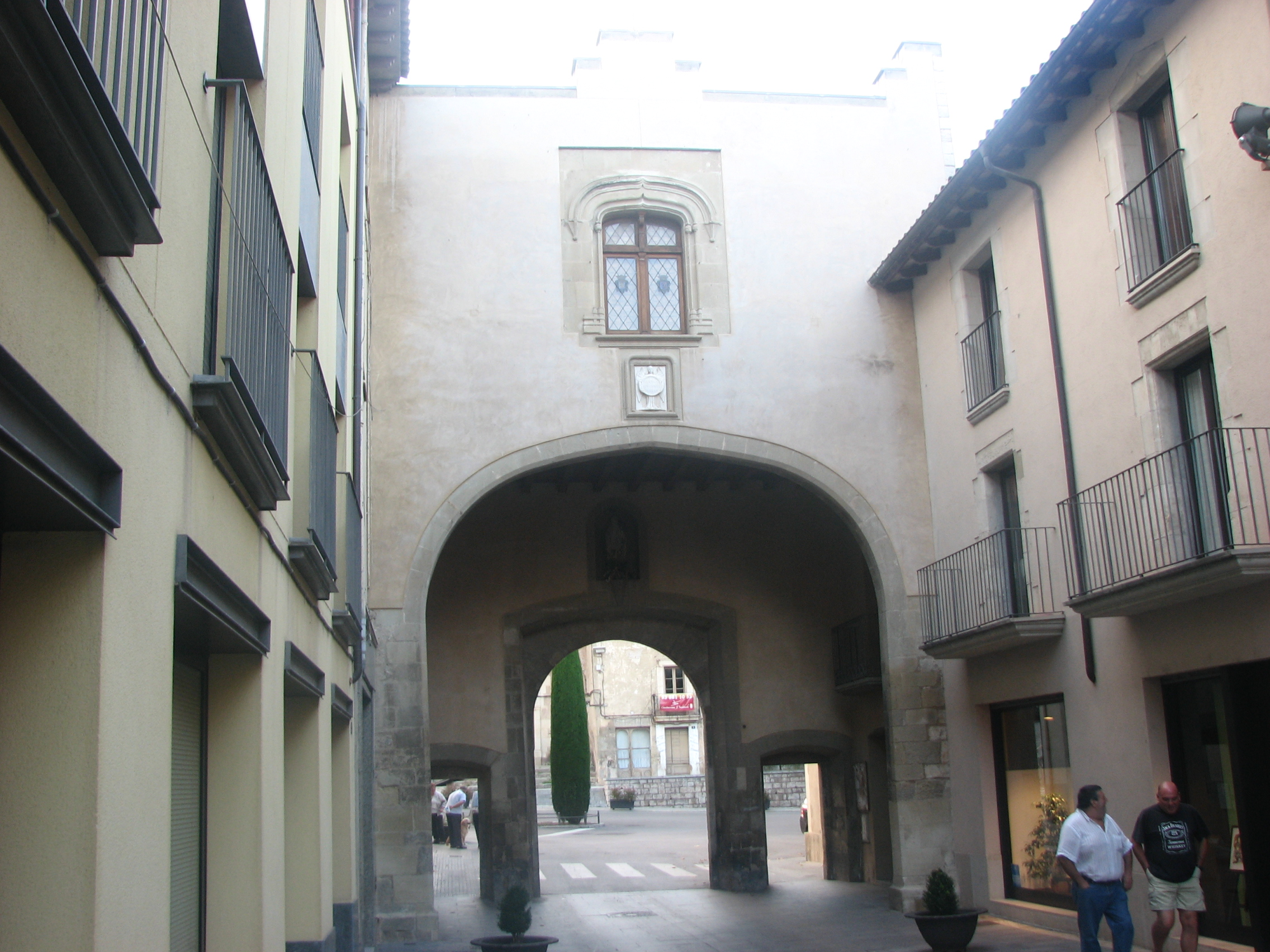 El Portal (Centelles) vist des de l'interior